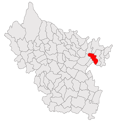 Categorie:Hărţi ale judeţului Buzău